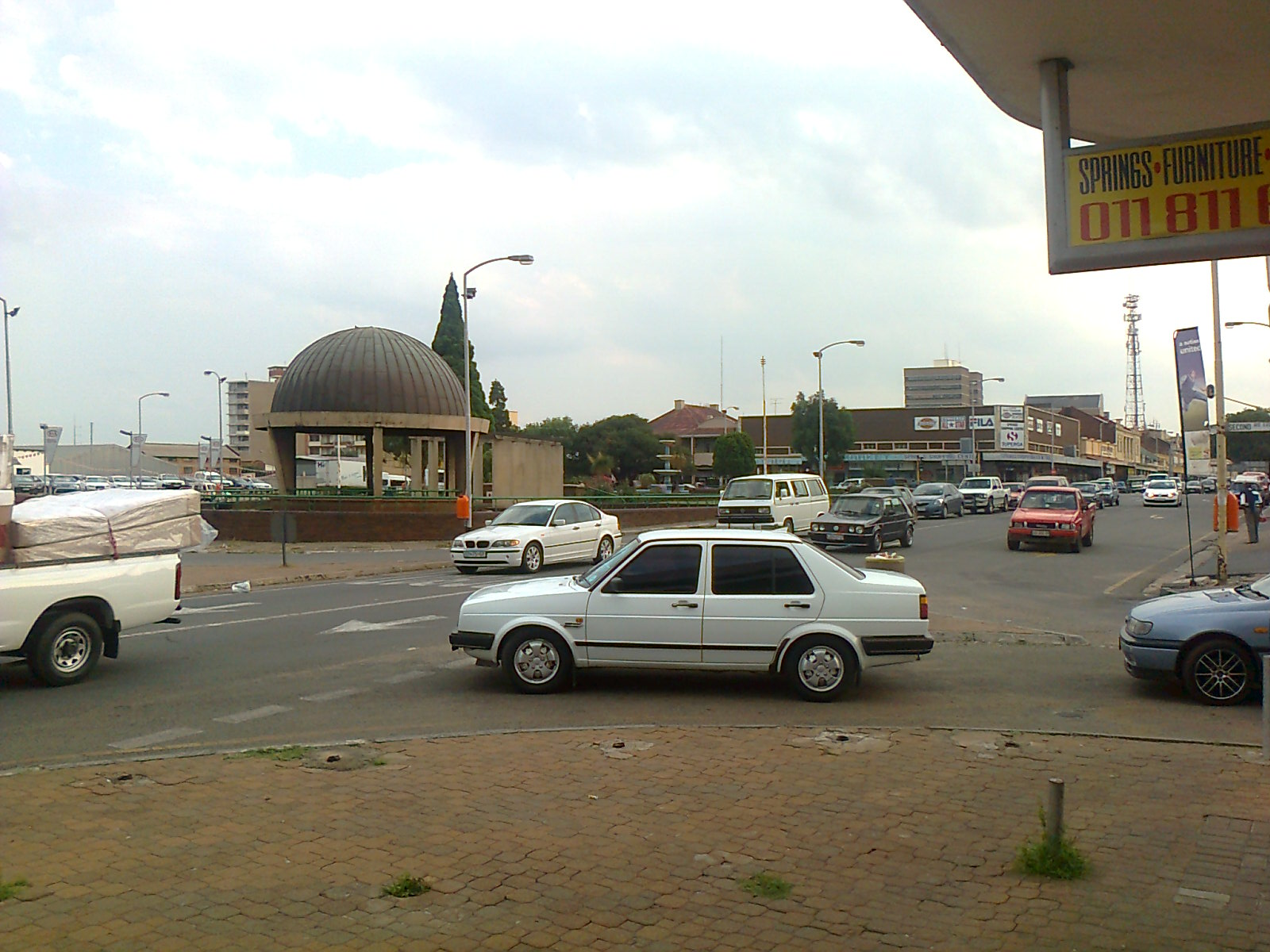 Springs, Gauteng